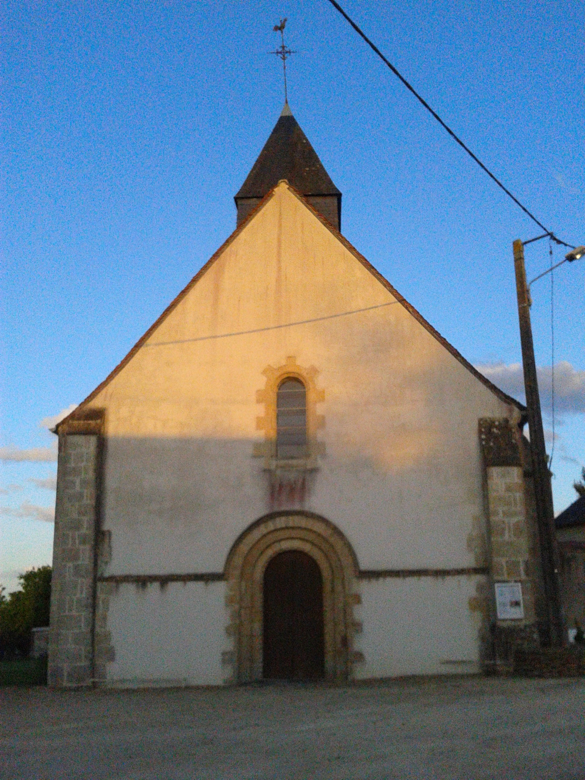 Vue sur la façade principale de l'église Saint-Pierre, de puis la route Baugy-Nérondes